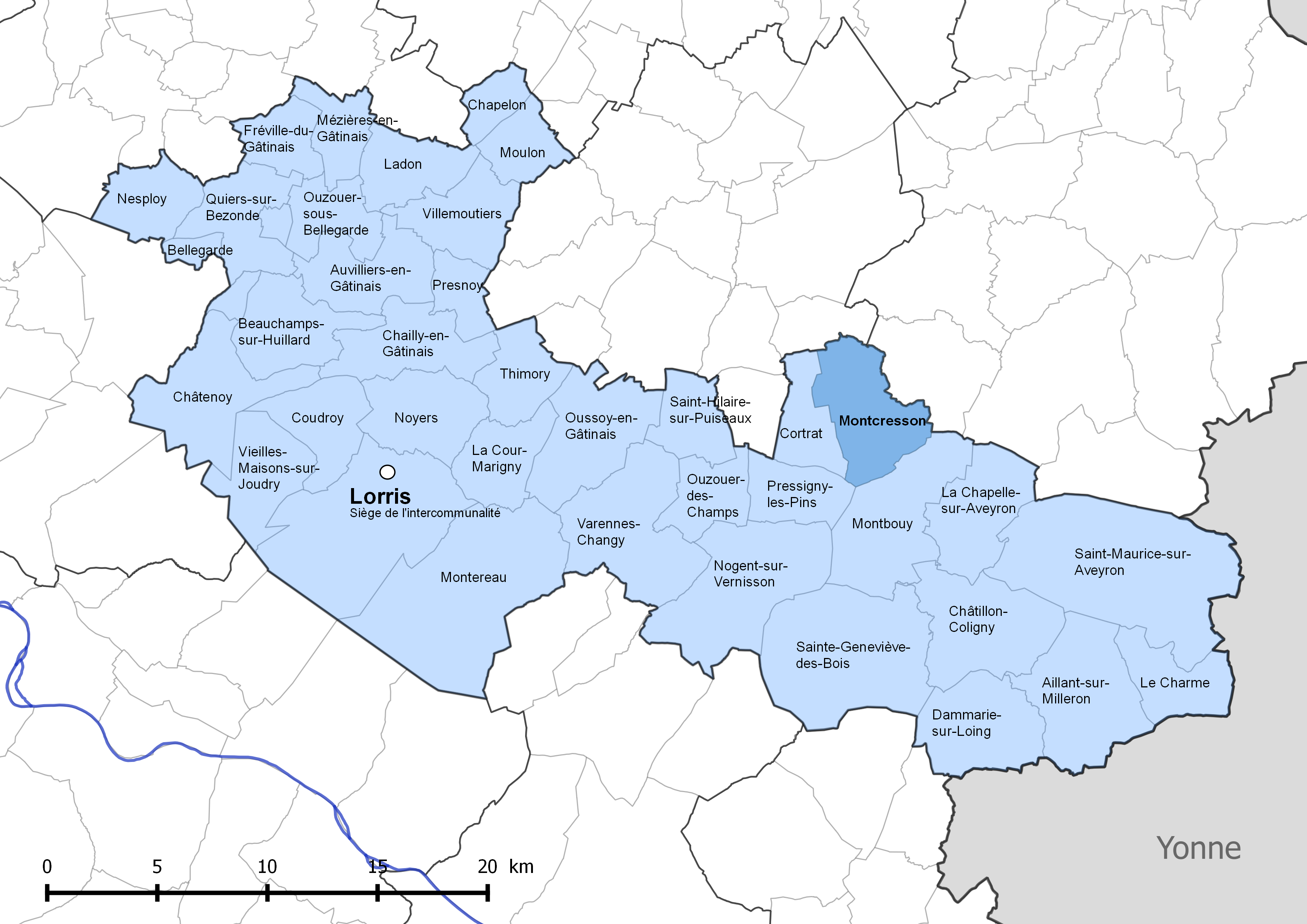 Périmètre de la communauté de communes Canaux et forêts en Gâtinais - Situation de la commune de Montcresson.